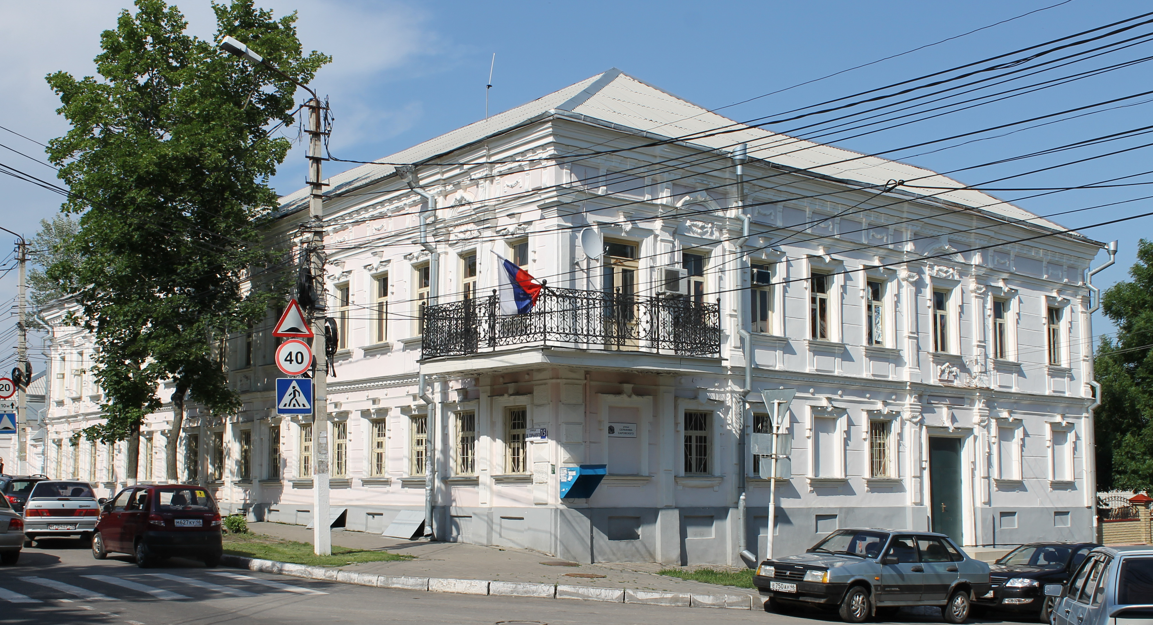 Дом купца Н. В. Гладкова (Курский базовый медицинский колледж) на улице Горького, 15 в городе Курске